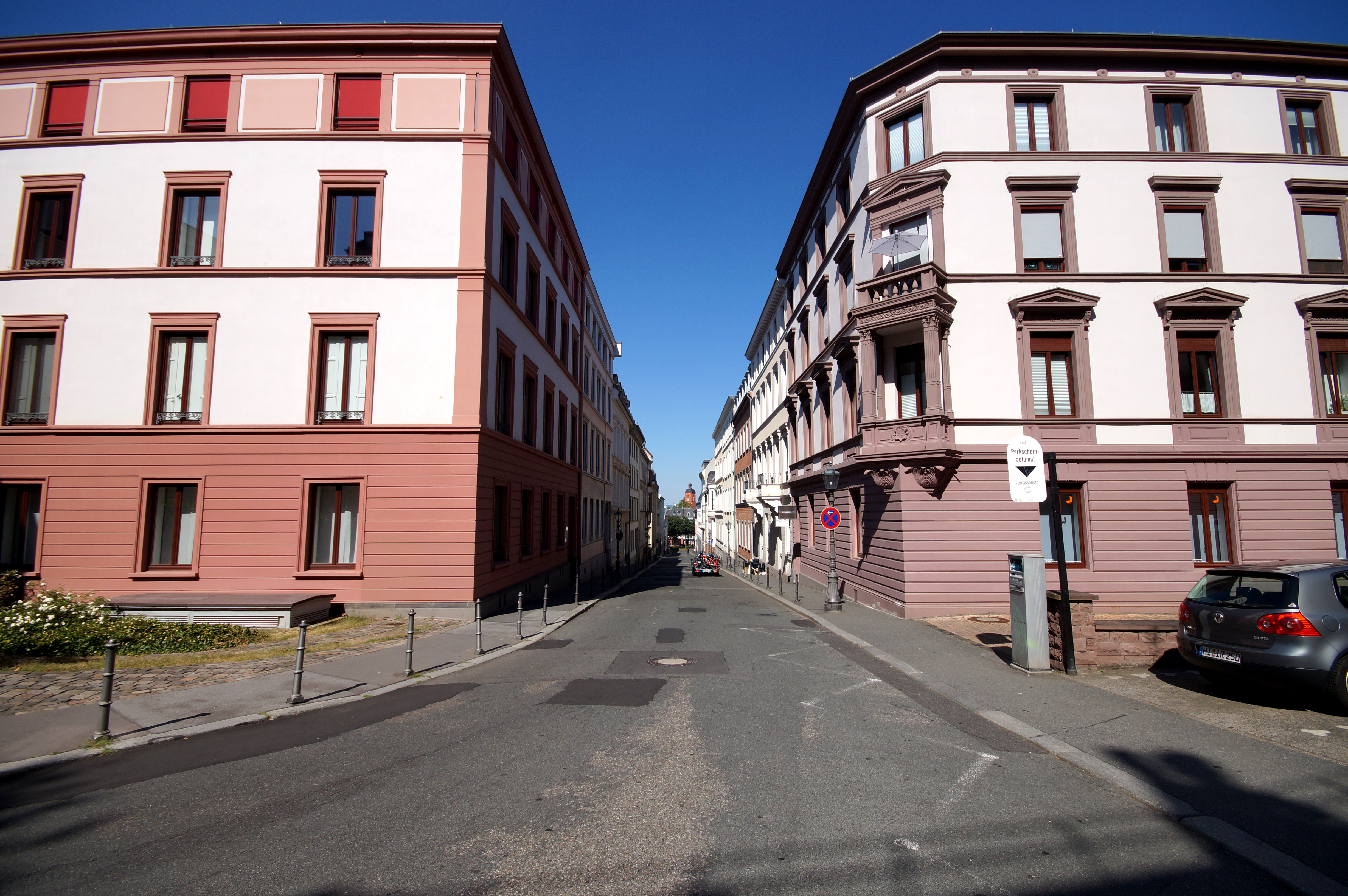 Emmerich-Josef-Straße in Mainz-Altstadt: Blick vom Kästrich Richtung Nordosten. Im Hintergrund ist die Pfarrkirche St. Quintin zu sehen.